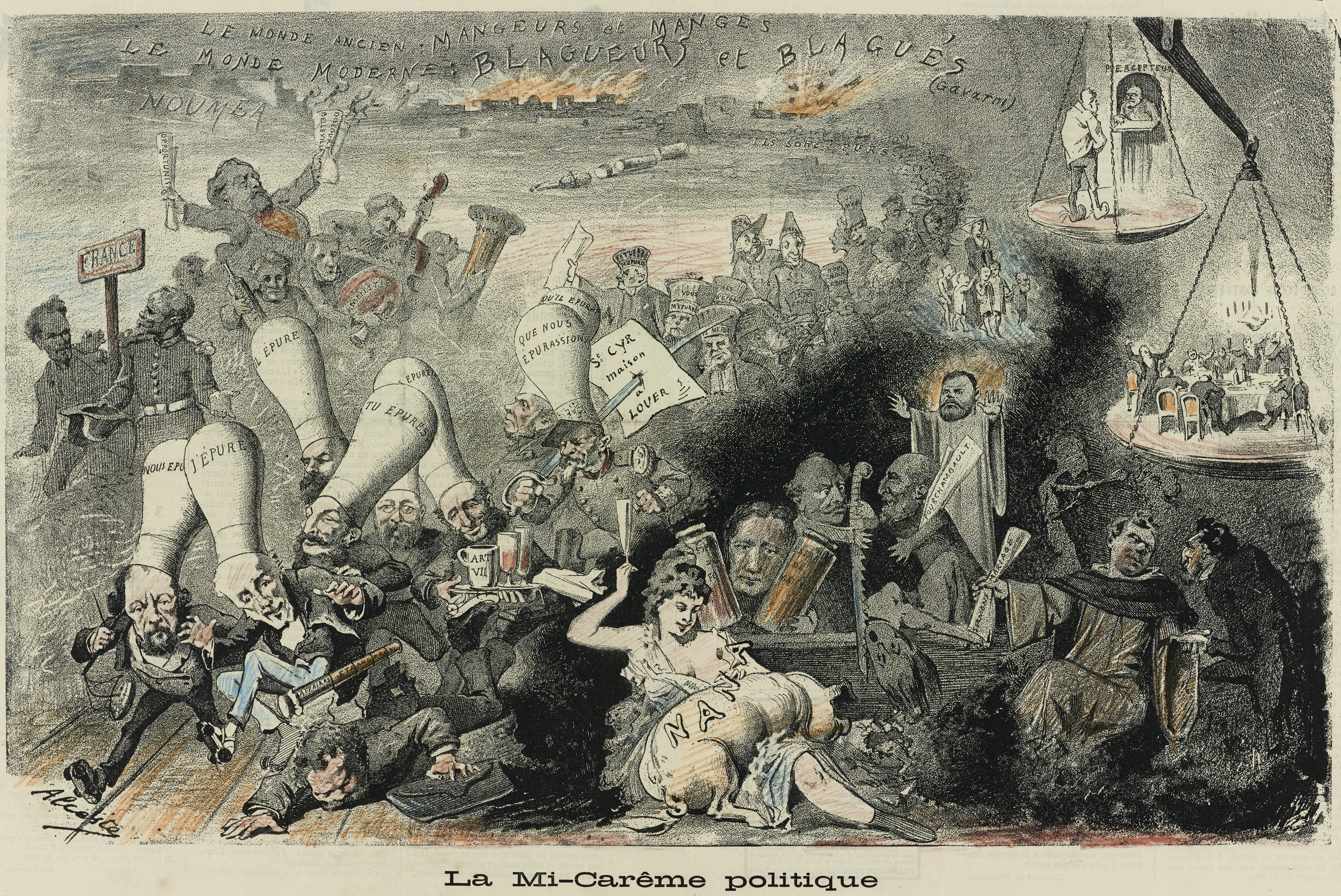 Mi-Carême politique. Caricature parue dans le premier numéro du Gaulois illustré (6 mars 1880).